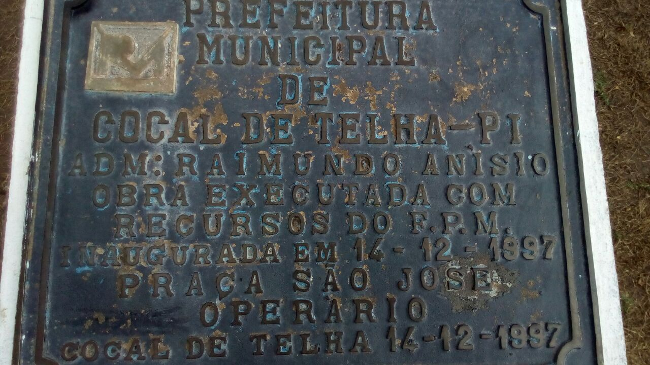 Placa de inaguração da Praça da matriz de Cocal de Telha, no Piauí.